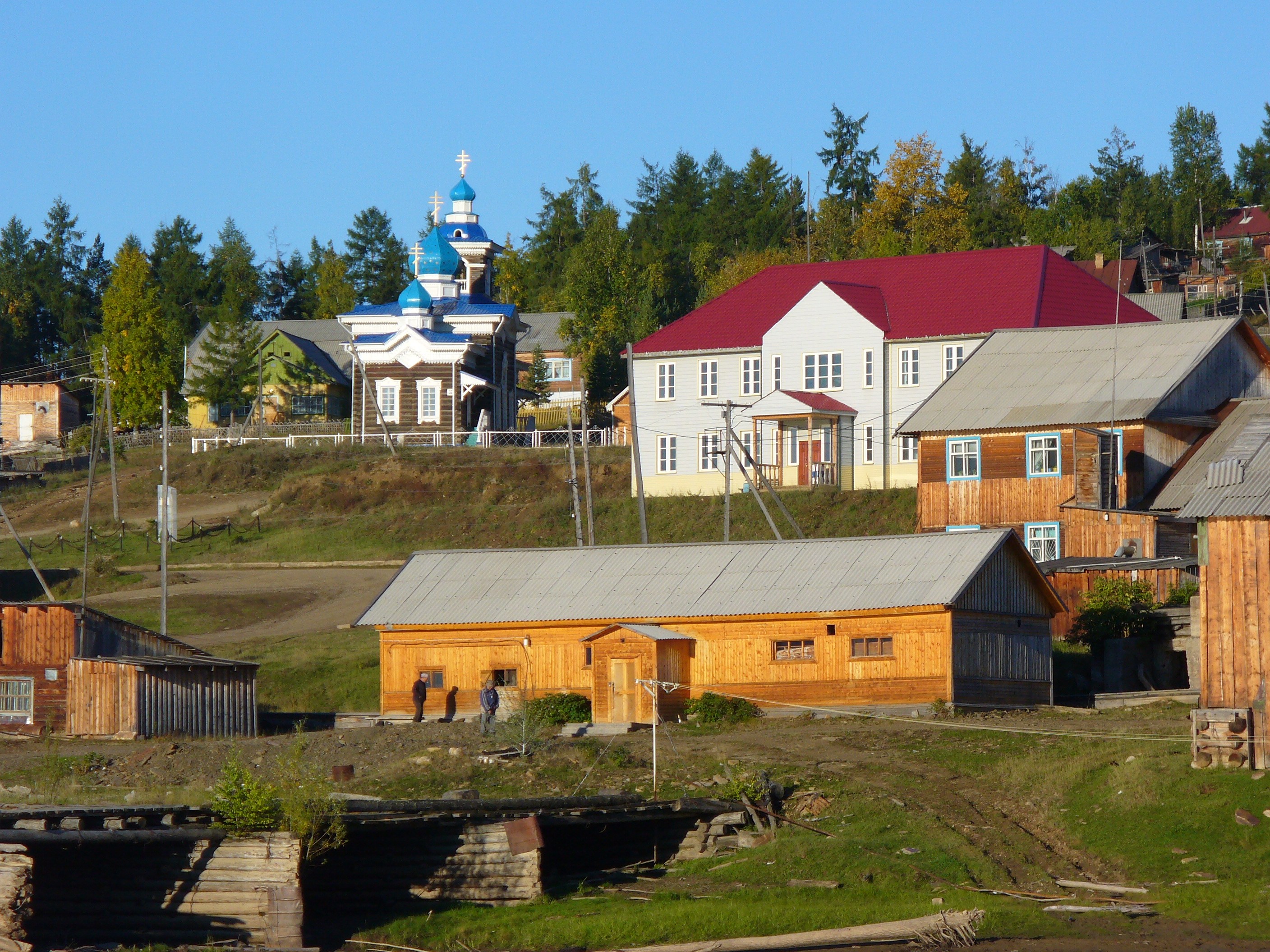 Центр с. Нелькан Хабаровского края